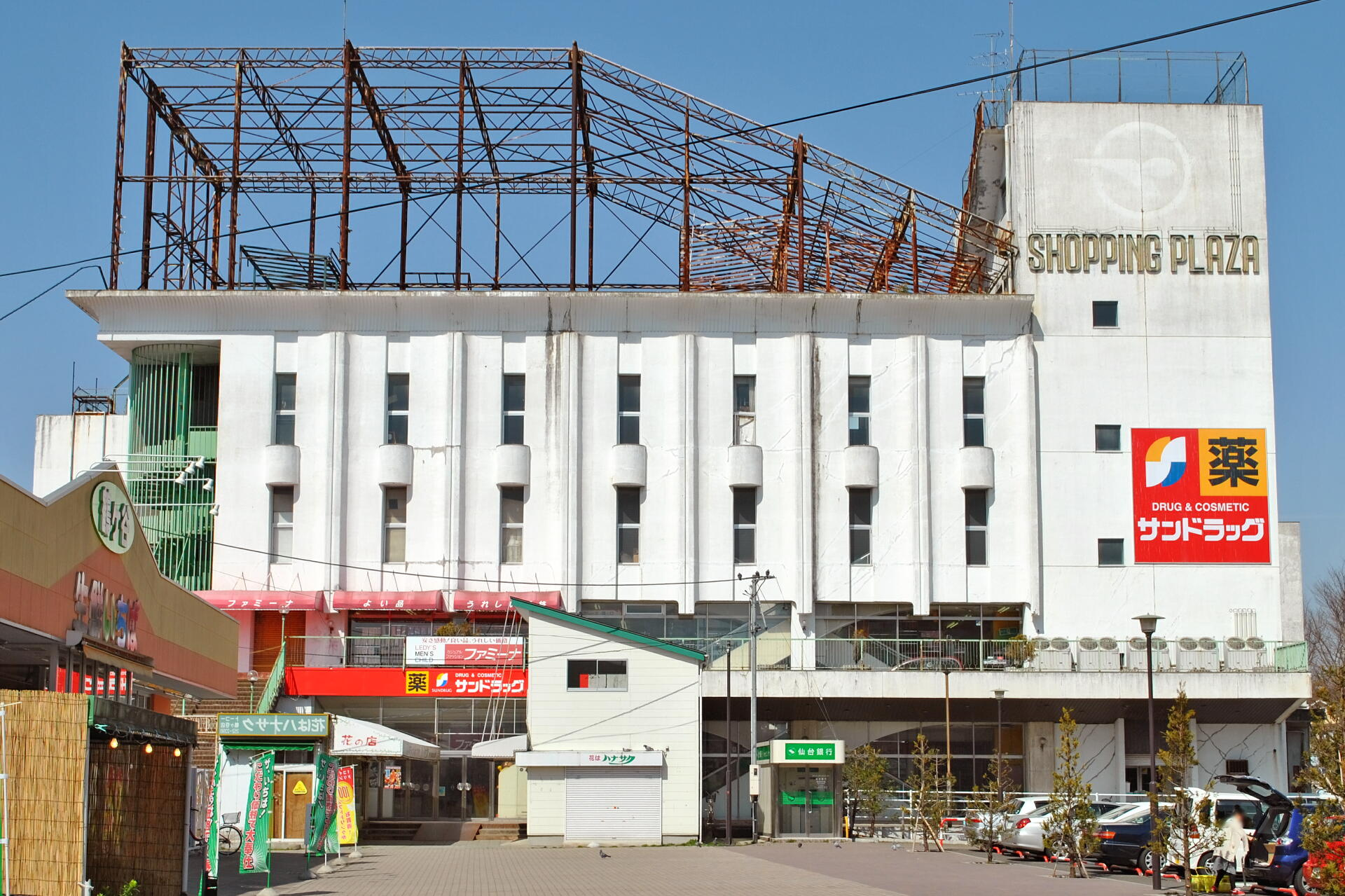 旧トーコーチェーン鶴ケ谷店（サンドラッグ鶴ケ谷店）